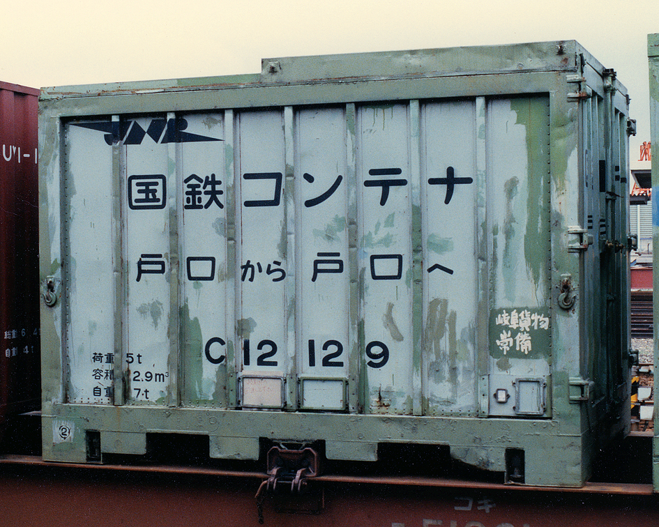 国鉄コンテナ C12 129